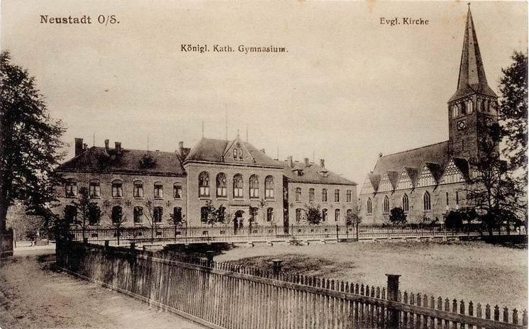 Prudnik, niemiecka pocztówka, przedstawiająca dzisiejsze I prudnickie Liceium Ogólnokształcące. Po prawo obecnie nieistniejący kościół ewangelicki